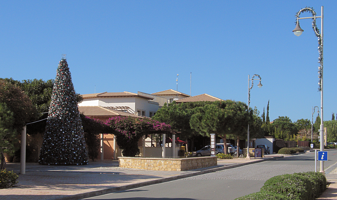 Рождество на Кипре